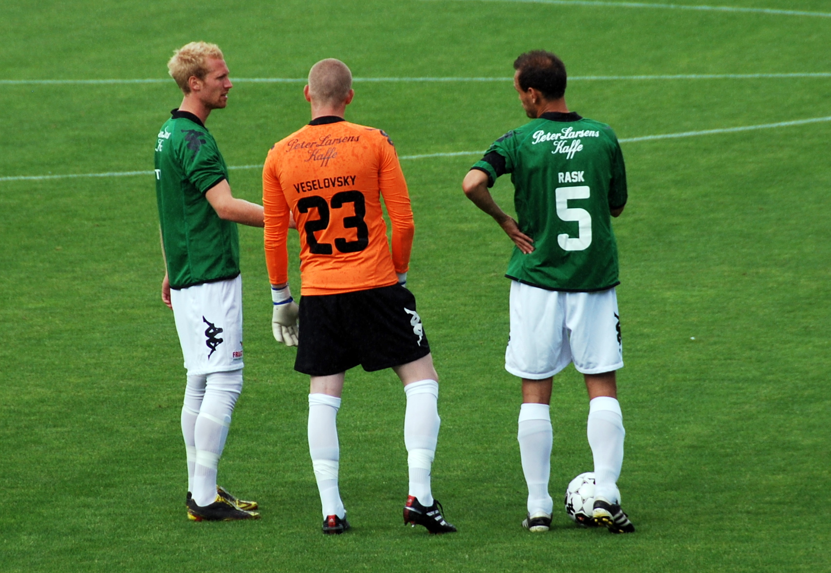 Fodboldspillerne (fra venstre) Jonas Thorsen, Robert Veselovsky og Mikkel Rask fra Viborg FF. Her efter 1. divisionskampen mod FC Roskilde på Viborg Stadion.